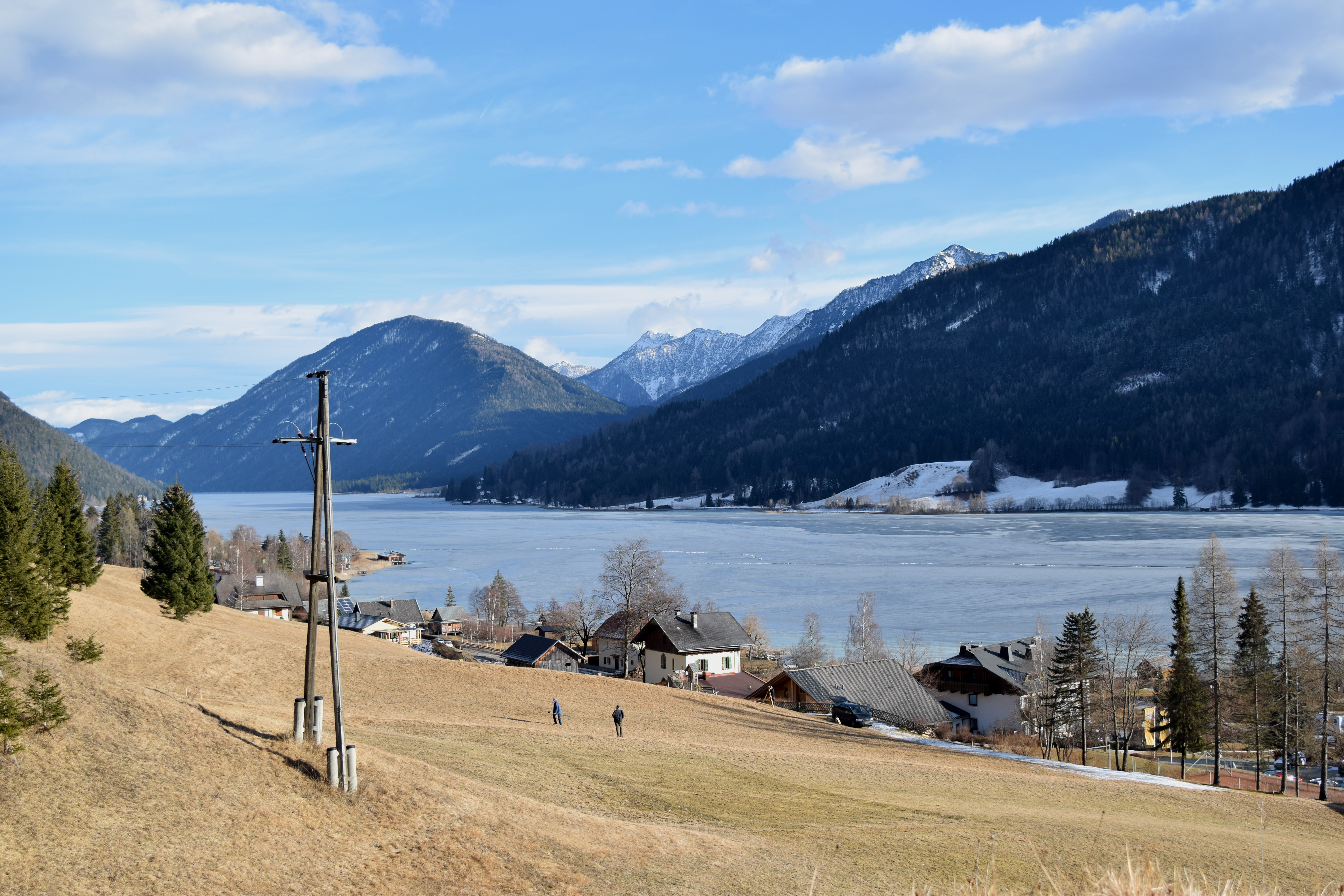 Der zugefrorene Weissensee im Winter. Fotografiert oberhalb der Ortschaft Techendorf.